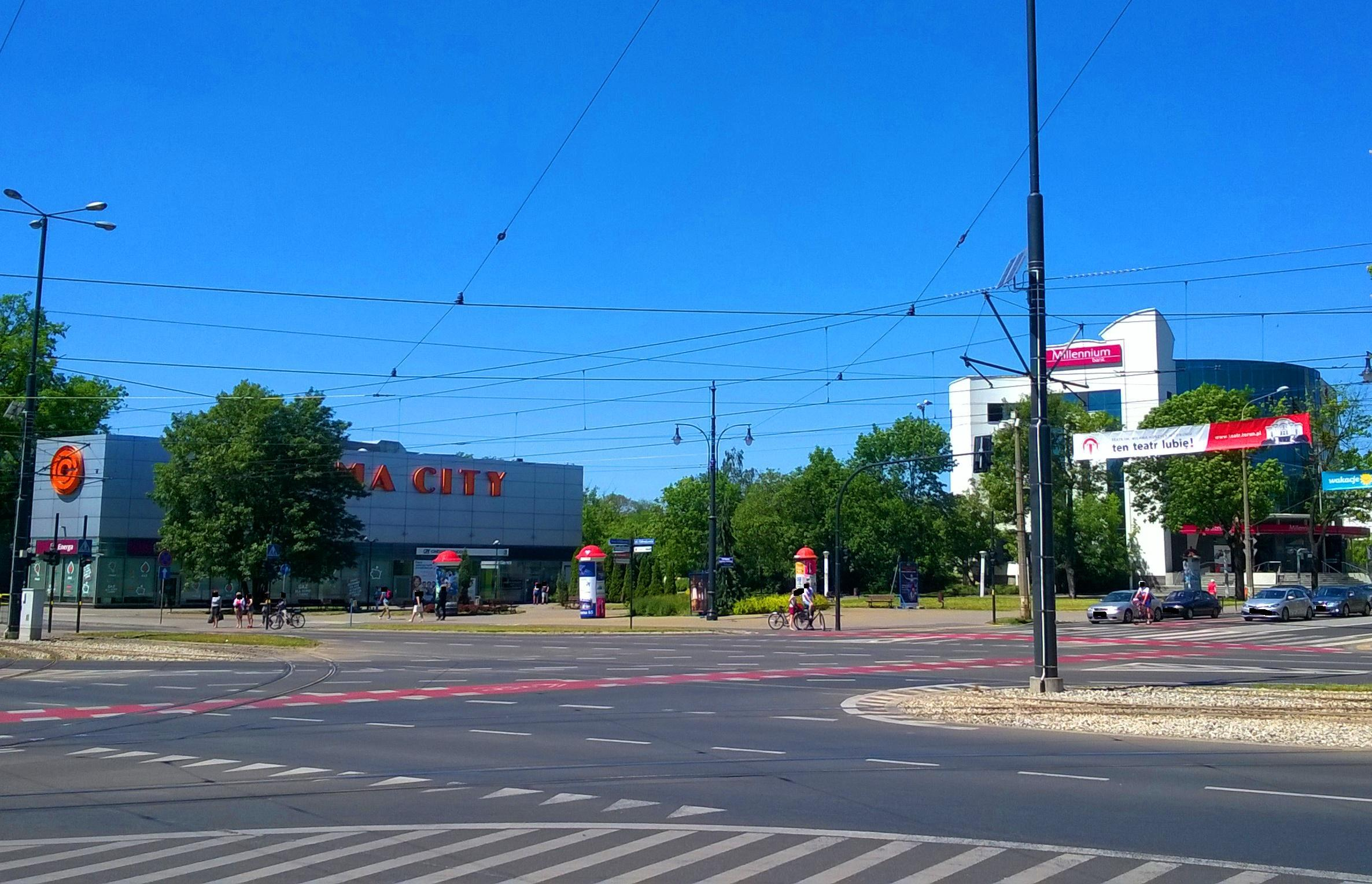 Plac NOT w Toruniu